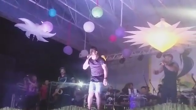 Cantor Avine Vinny em 2016